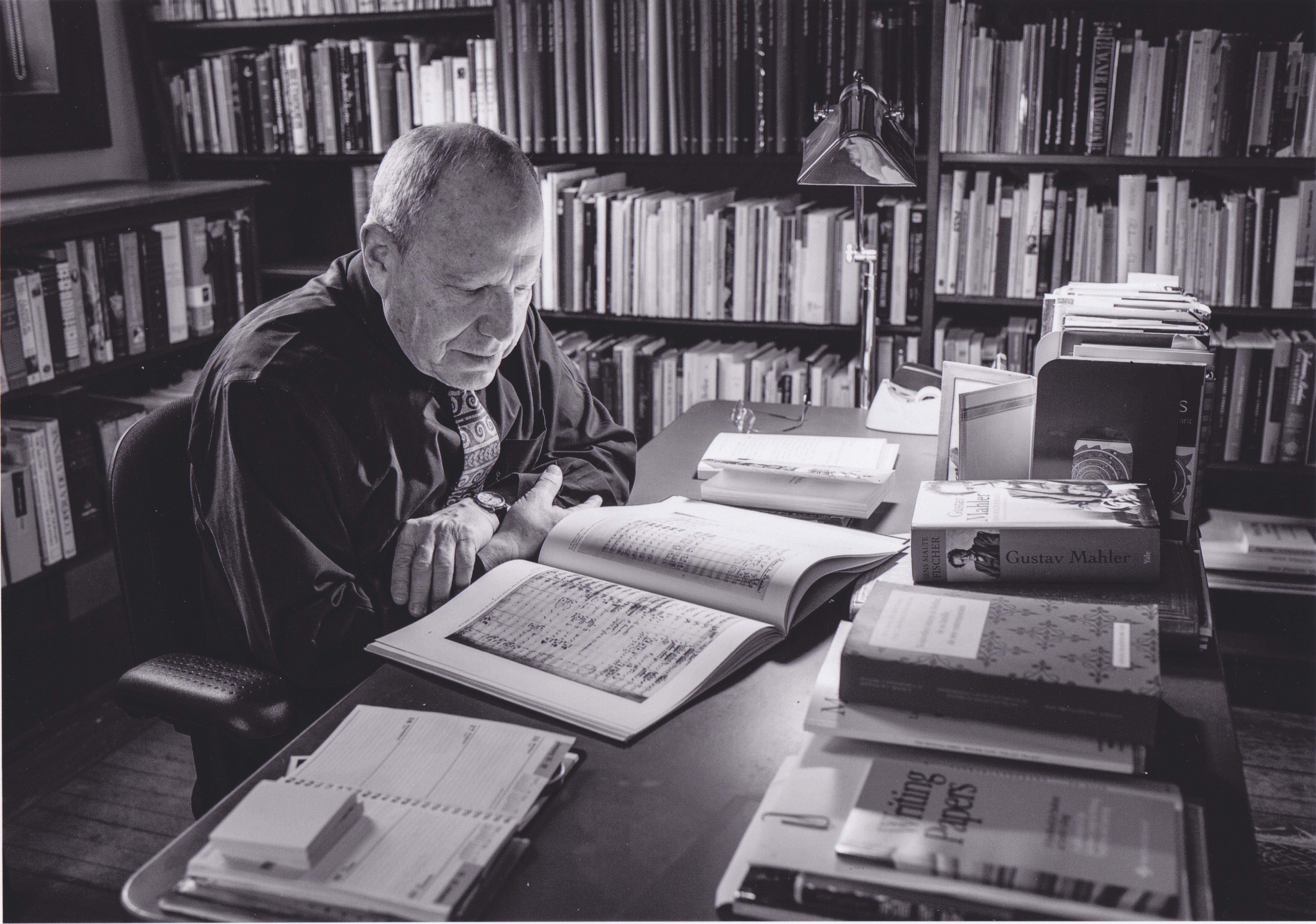 Photographie de Peter Bloom par Tad MALEK